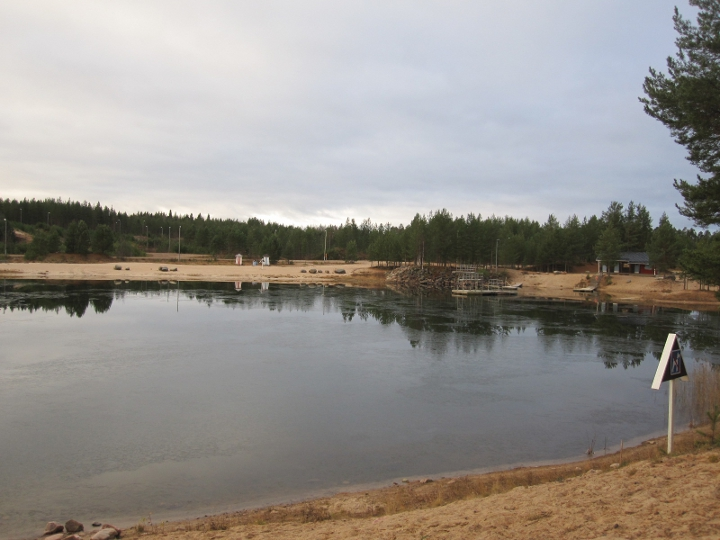 Rantakylän virkistysalue Limingan Rantakylässä.